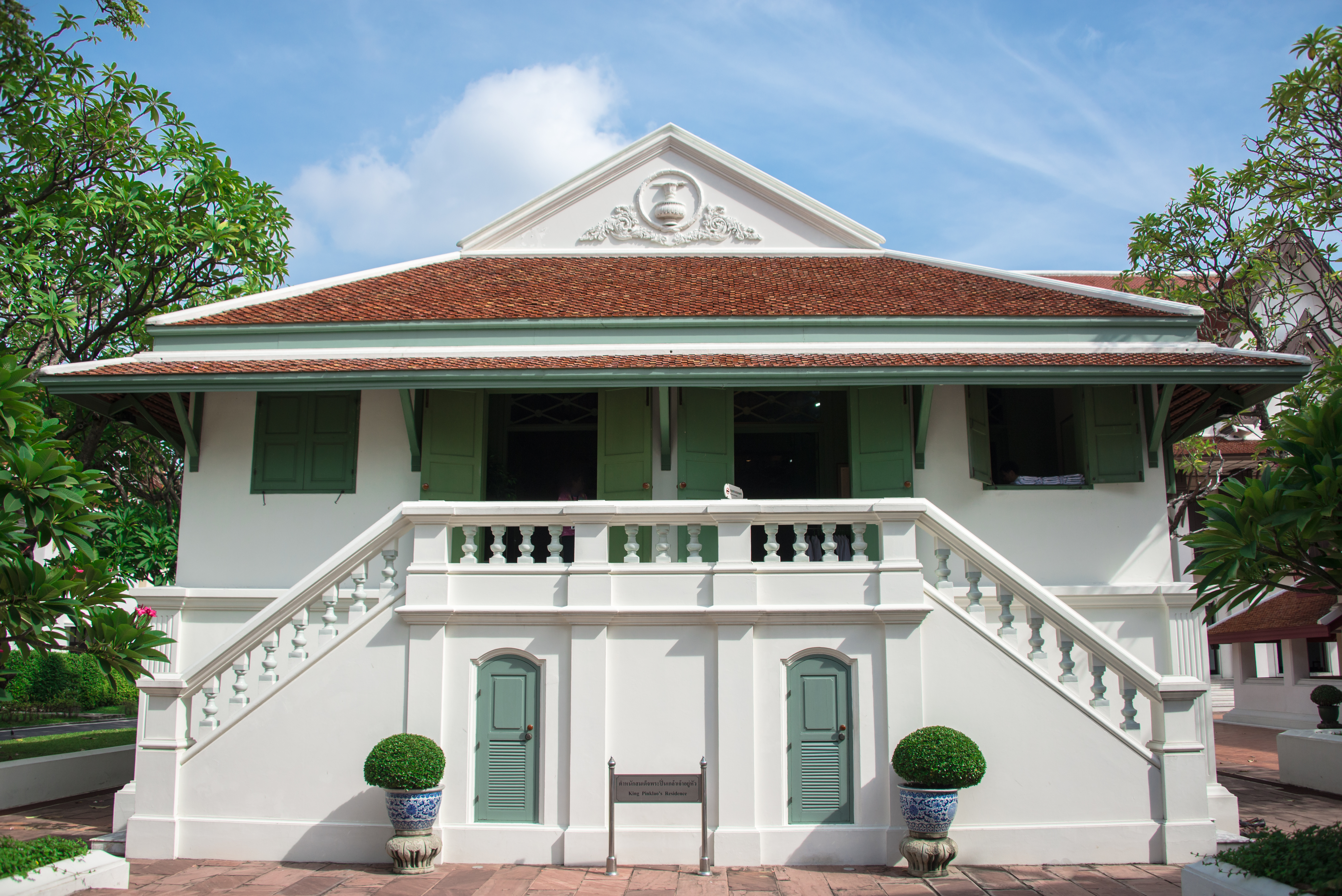 พระราชวังเดิม